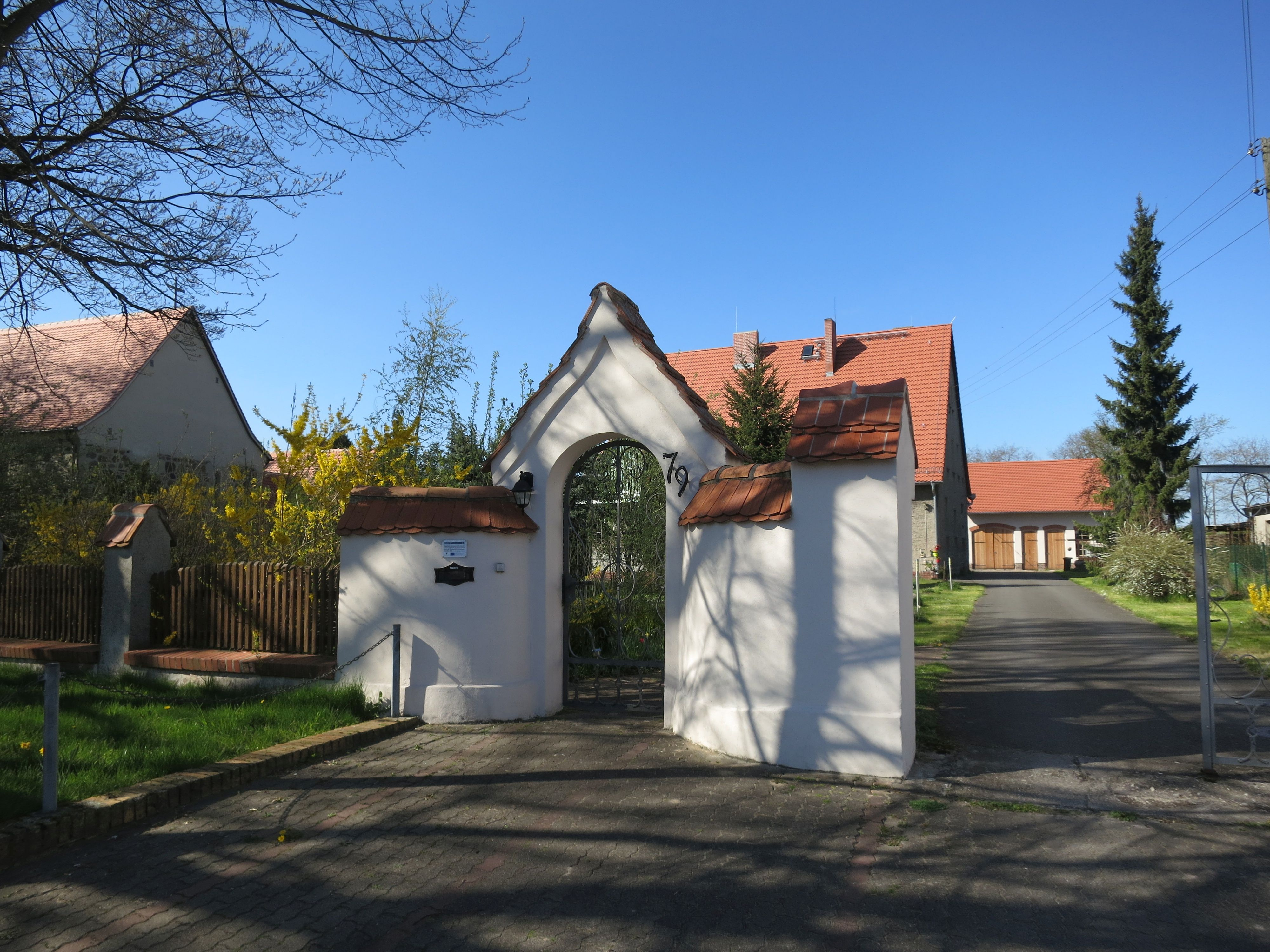 Boßdorf, Eingang zum Pfarrhaus